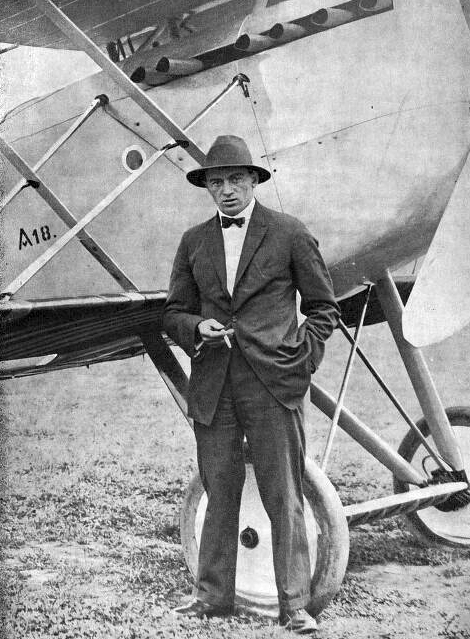 Pilot Josef Novák (1893 - 1934)